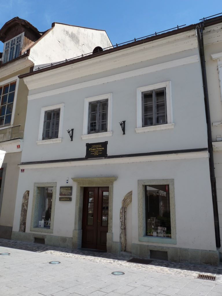 Prešernovo stanovanje v Kranju